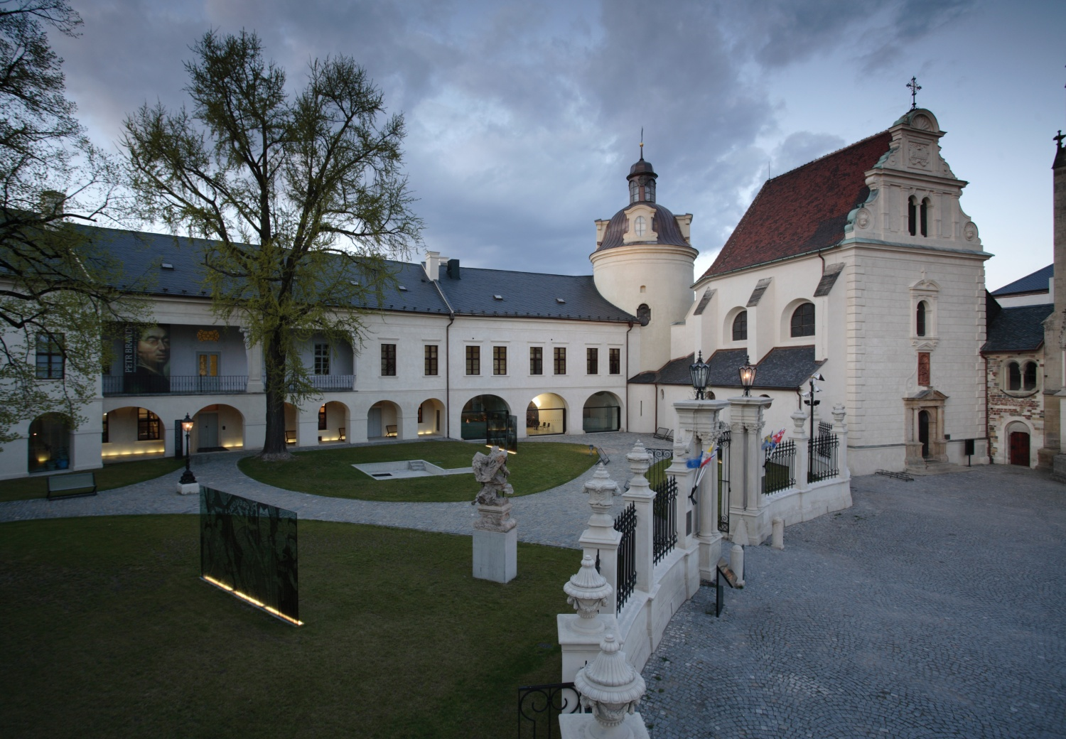 foto: Markéta Ondrušková/MUO